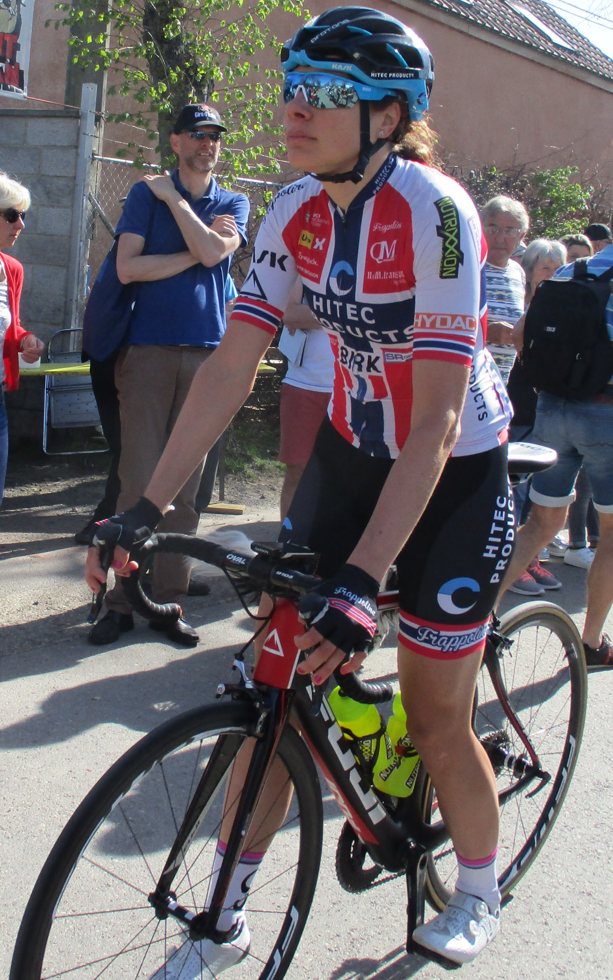 Start van de Waalse Pijl 2018 op de Mur van Huy.